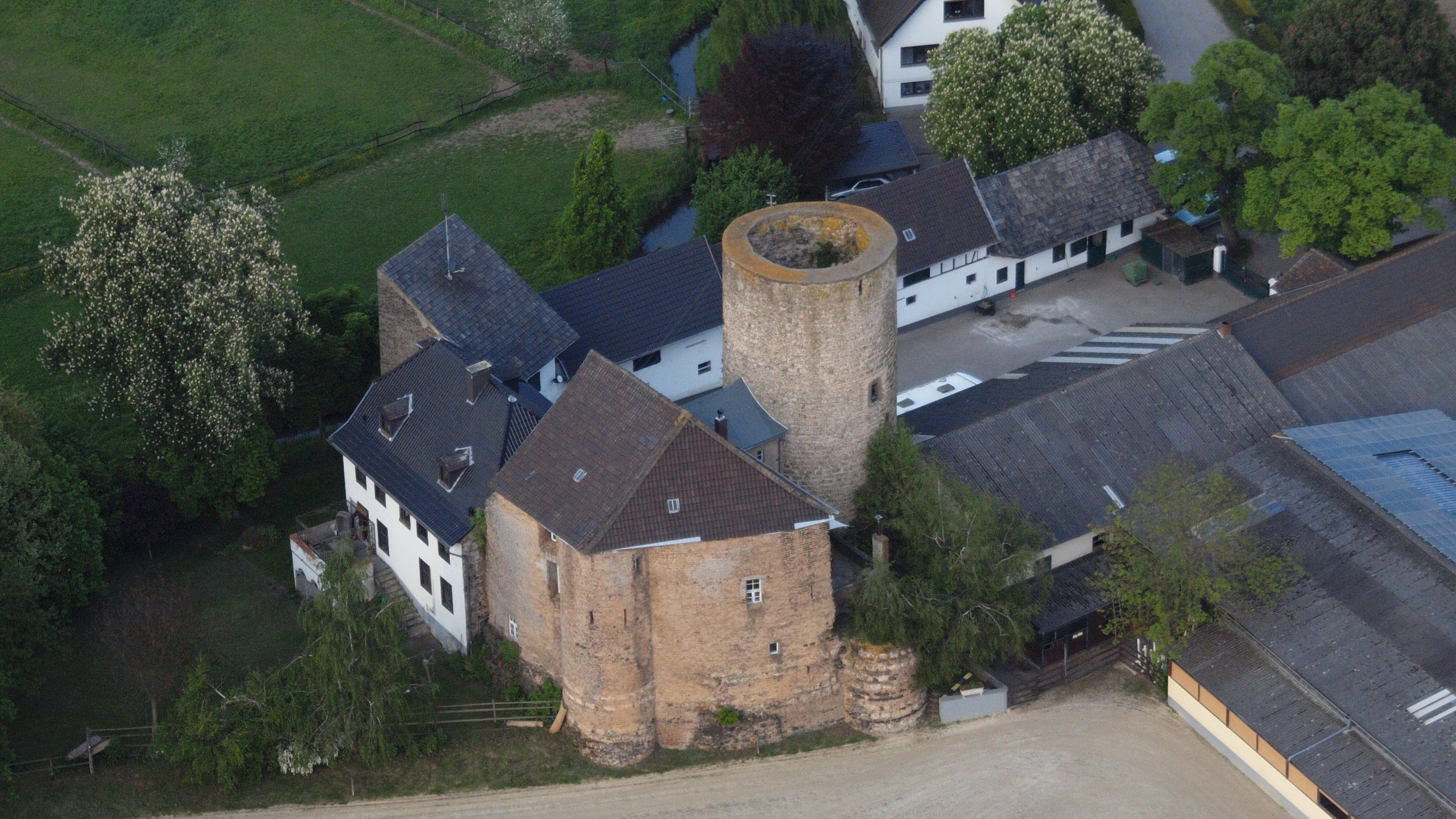 Burg Münchhausen, Wachtberg: Luftaufnahme aus westlicher Richtung